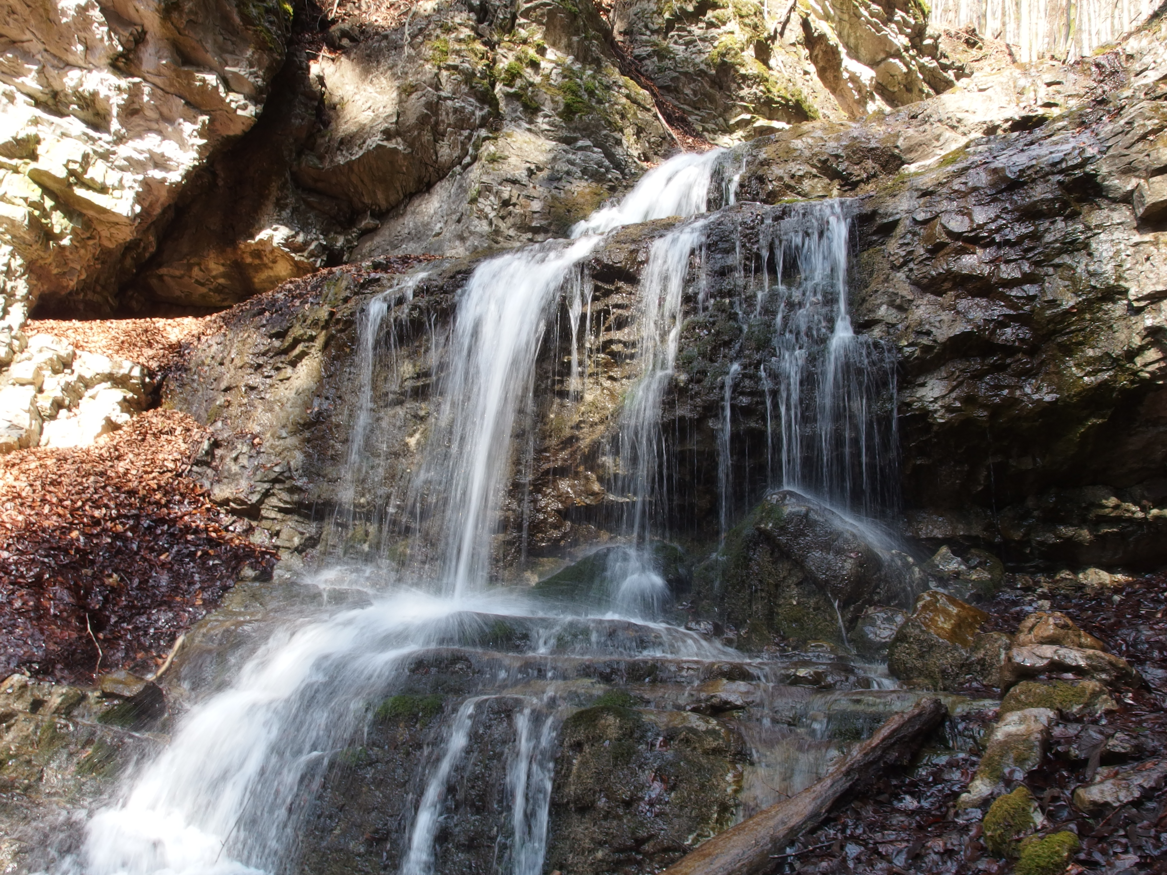 Kaskádový vodopád v Došnej